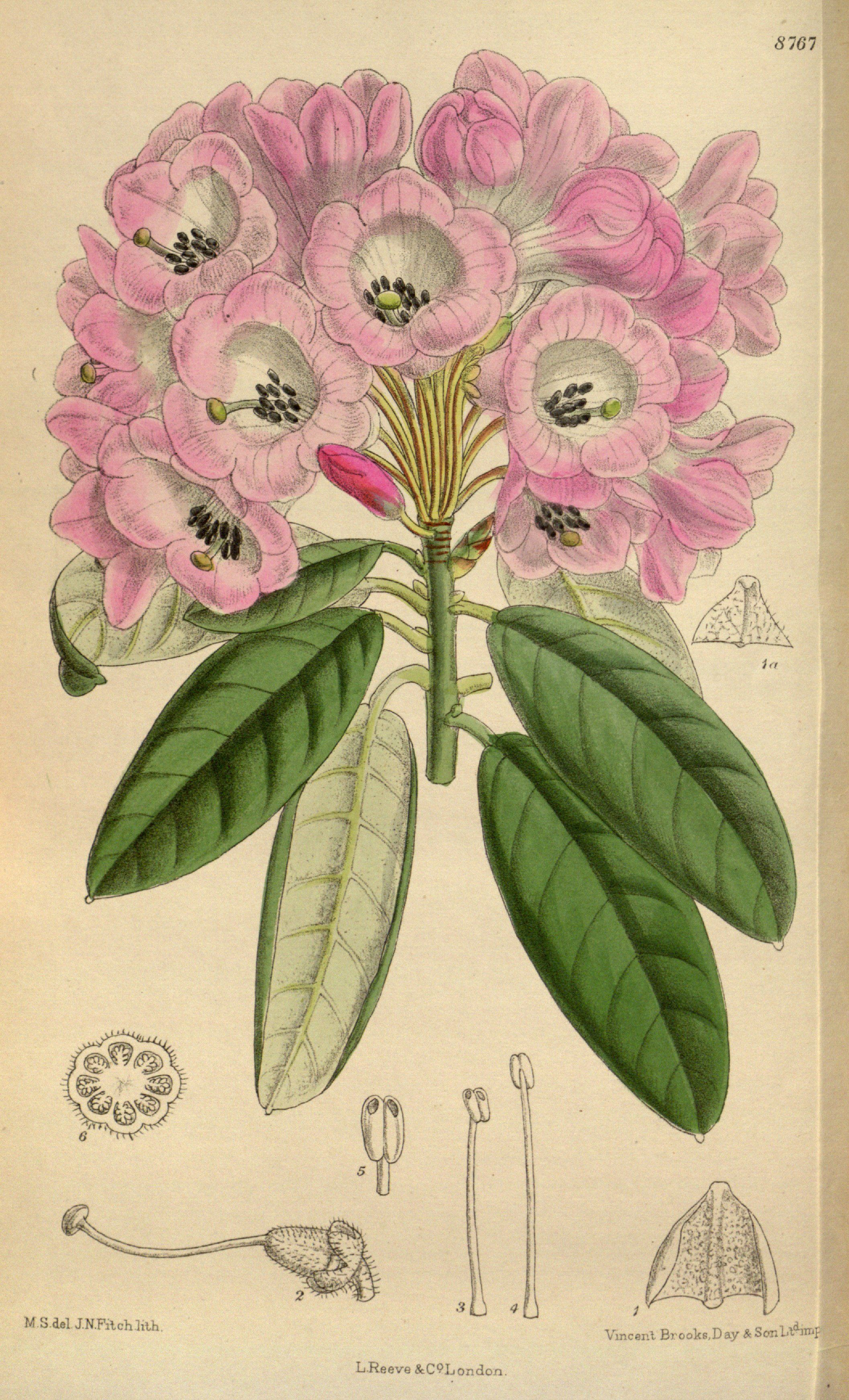 Rhododendron argyrophyllum var. leiandrum (= var. nankingense), Ericaceae